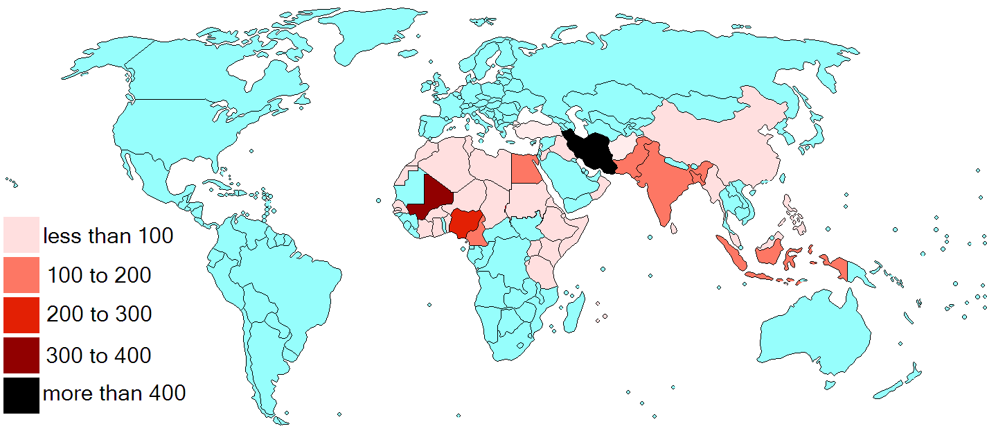 Nationalities of victims of 2015 Mina stampede including deceased, injured and missing.